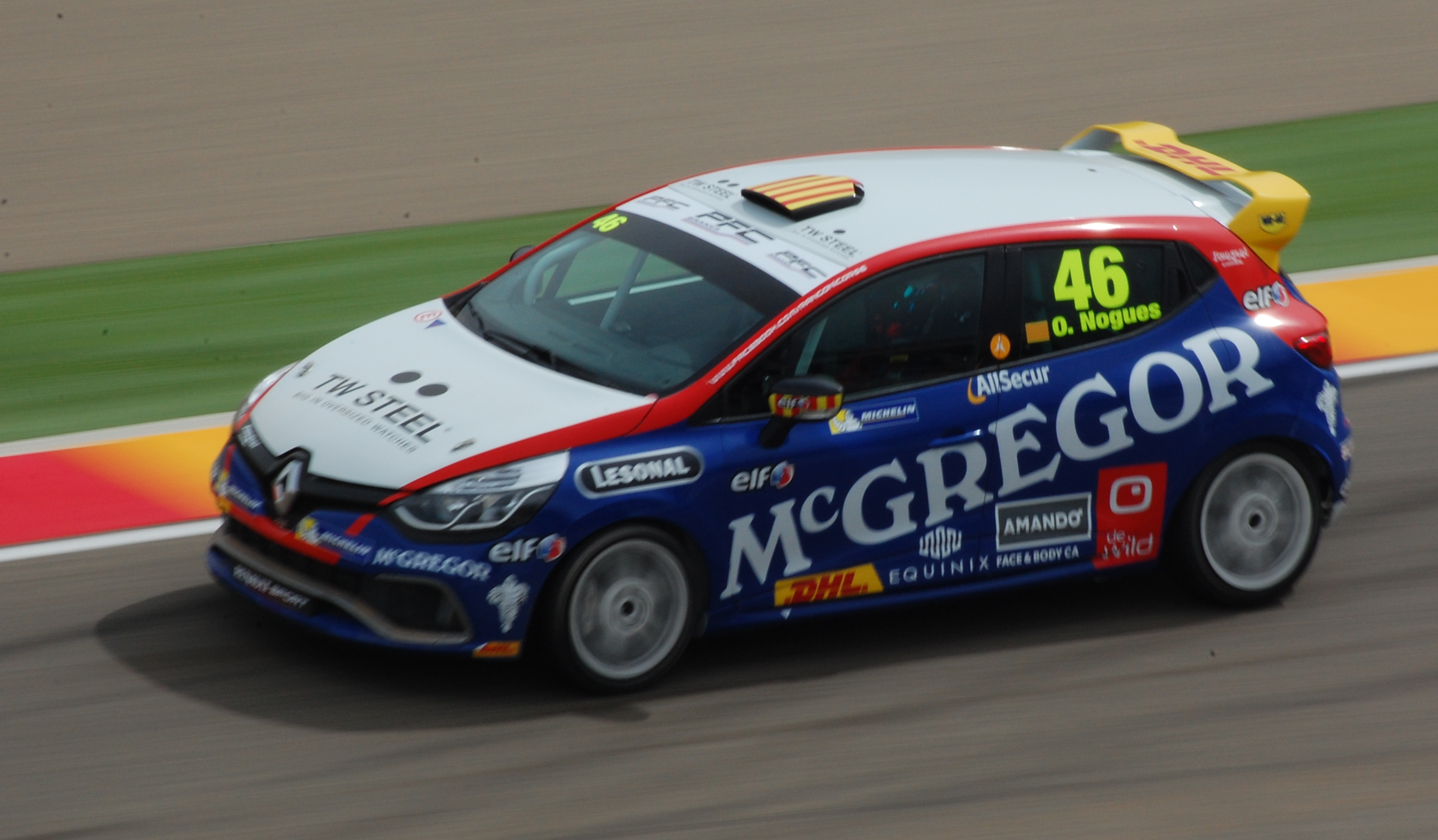 Aragonés: Óscar Nogués Motorland 2014